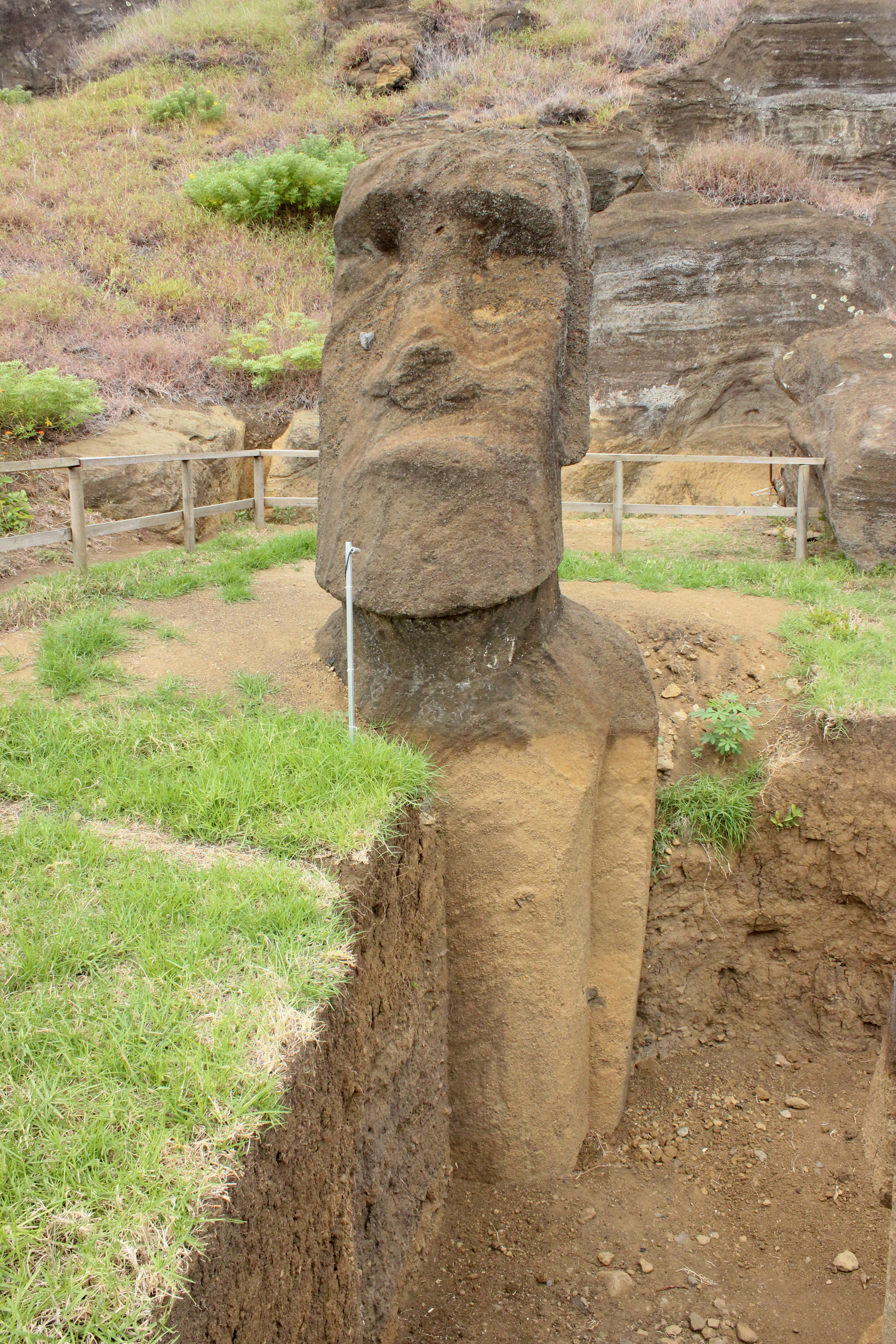 Moai ubicado en el volcán Rano Raraku "Cantera" donde se fabricaban estas estatuas. This is a photo of a national monument in Chile: 628